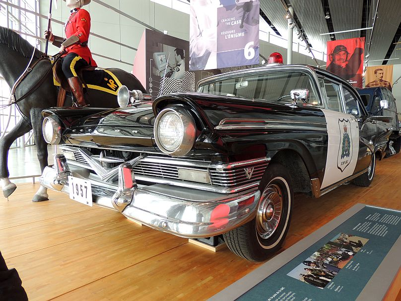 RCMP Heritage Centre